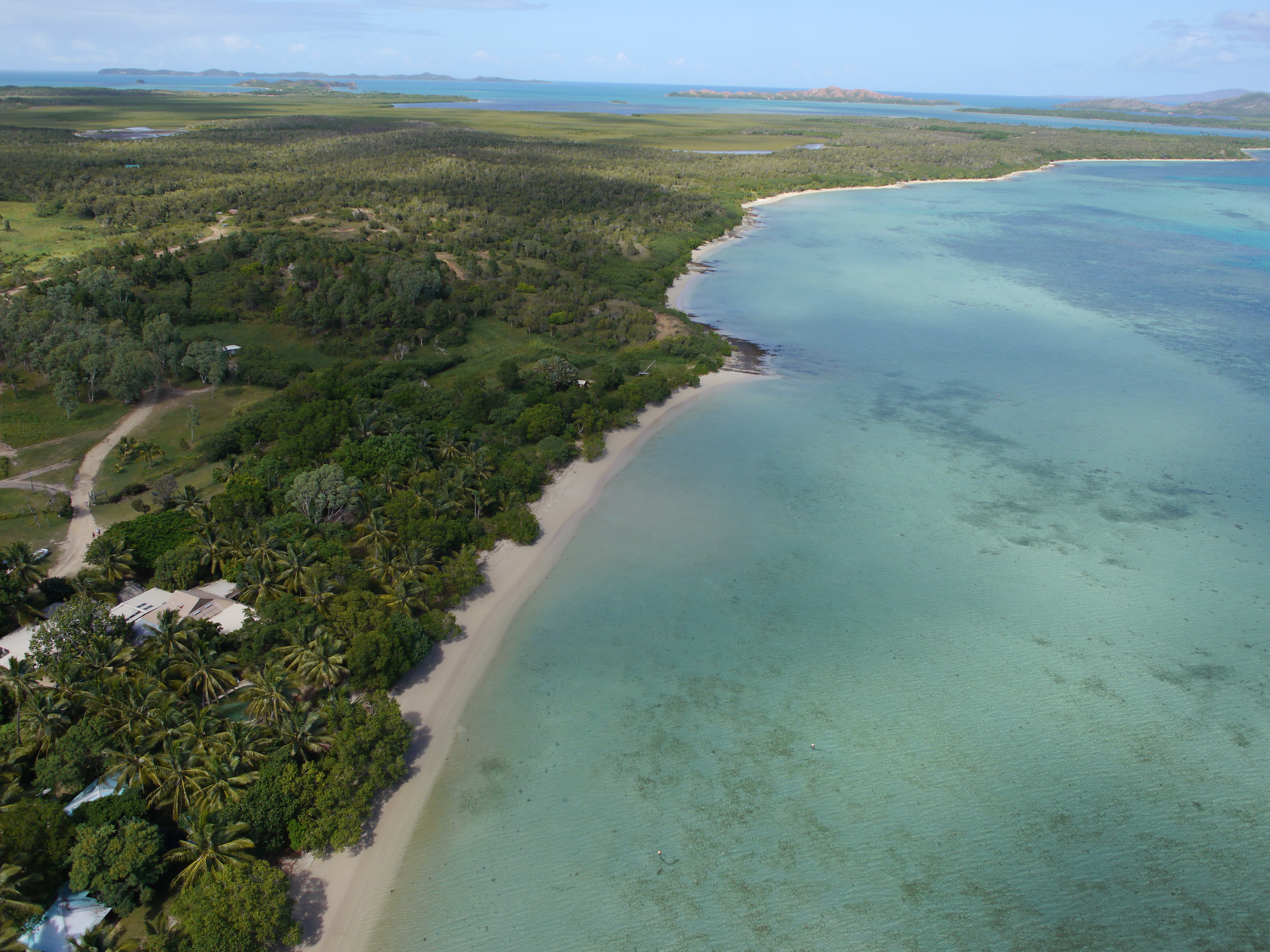 Poingam, Nouvelle-Calédonie